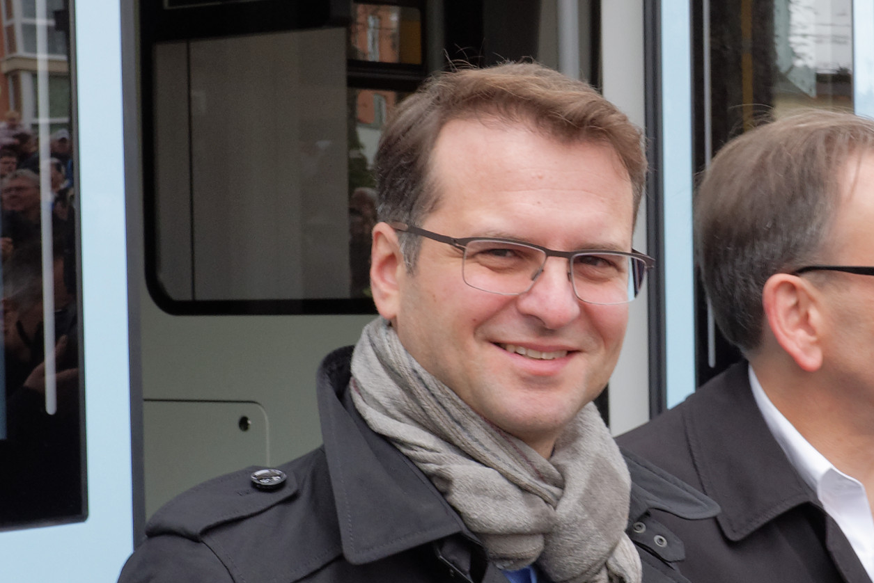 neue Schwebebahn von außen in Wuppertal